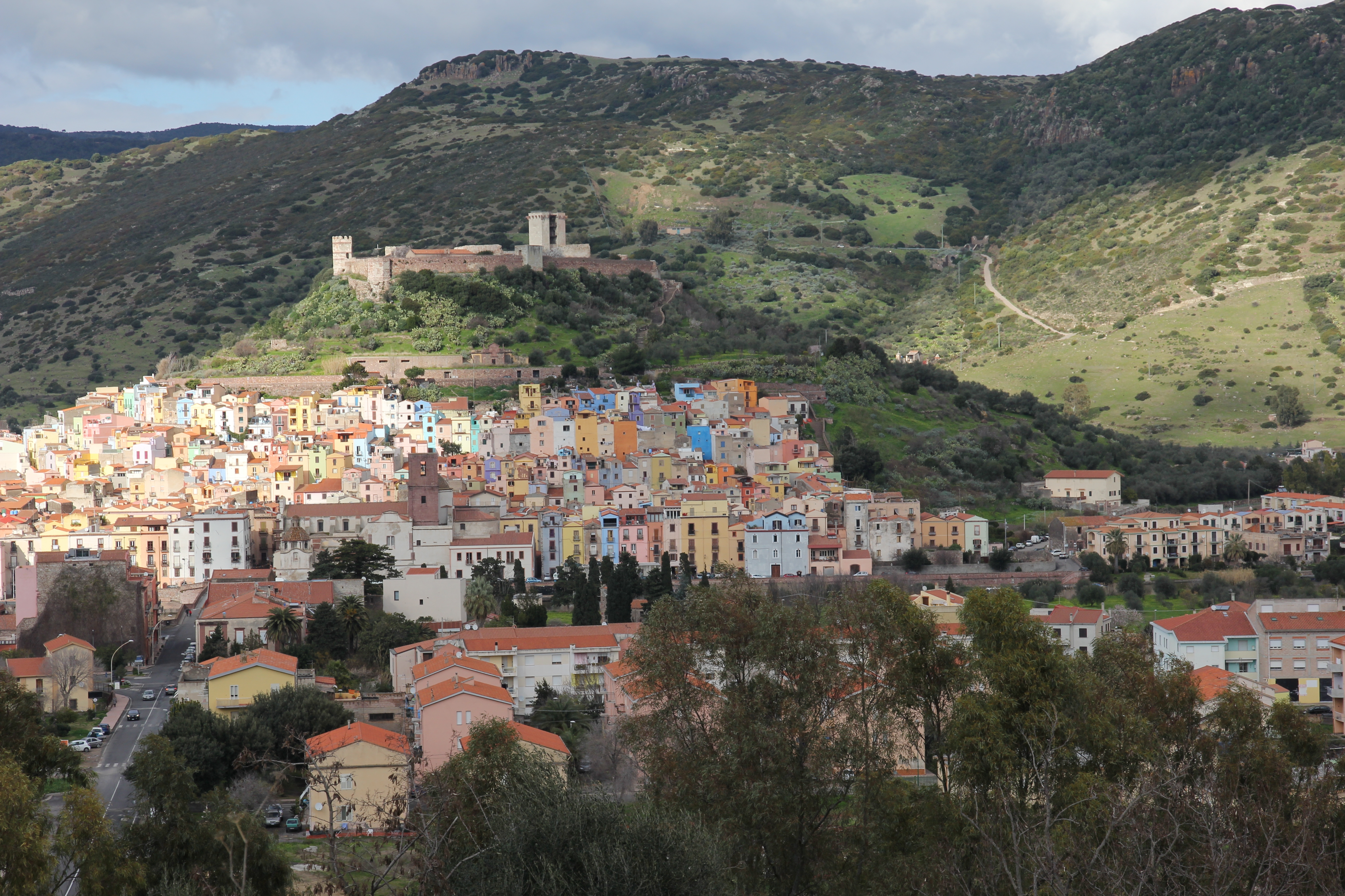 Bosa - Panorama